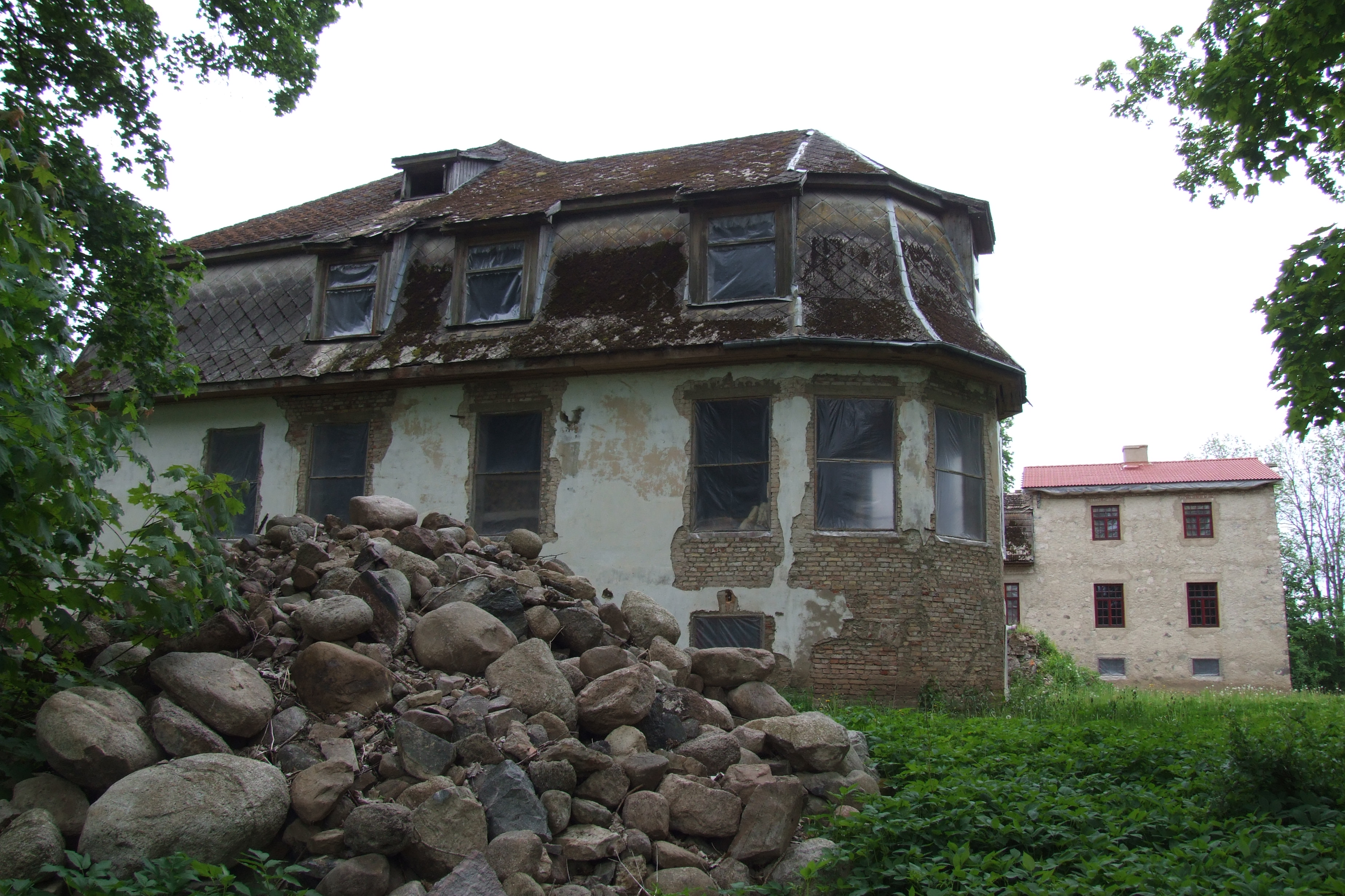 Madlienas Lielā muiža, 28.05.2011.